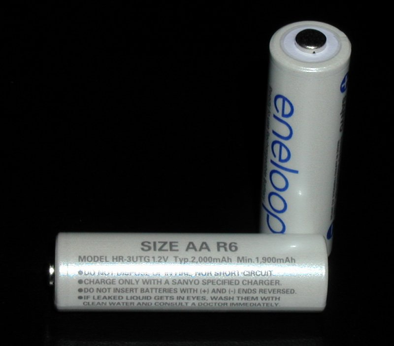 Sanyo Eneloop